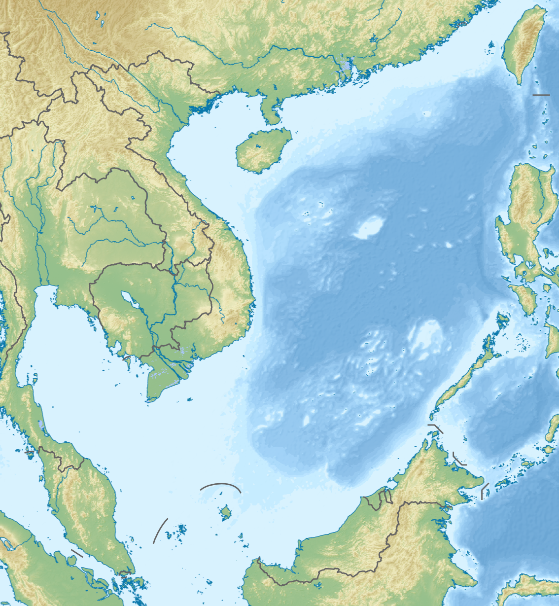 Физическая карта Южно-Китайского моря.